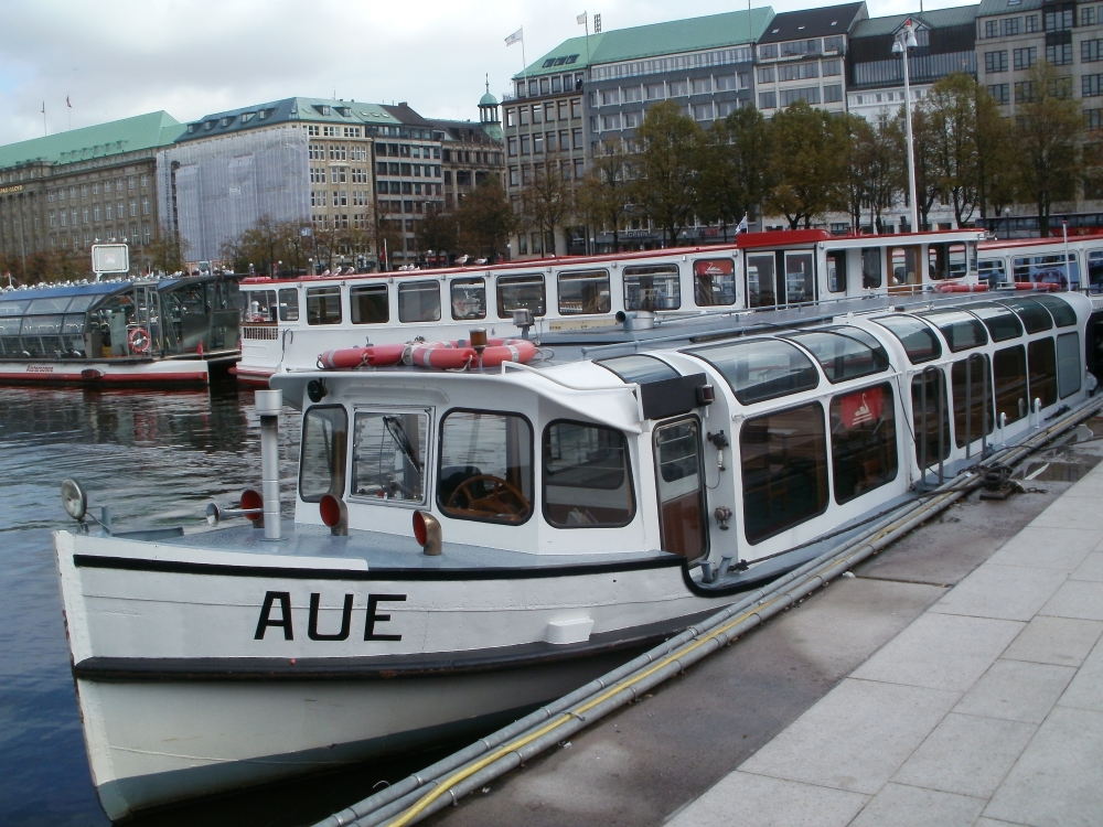 Alsterdampfer Aue am Alsteranleger Jungfernstieg This is a photograph of an architectural monument.